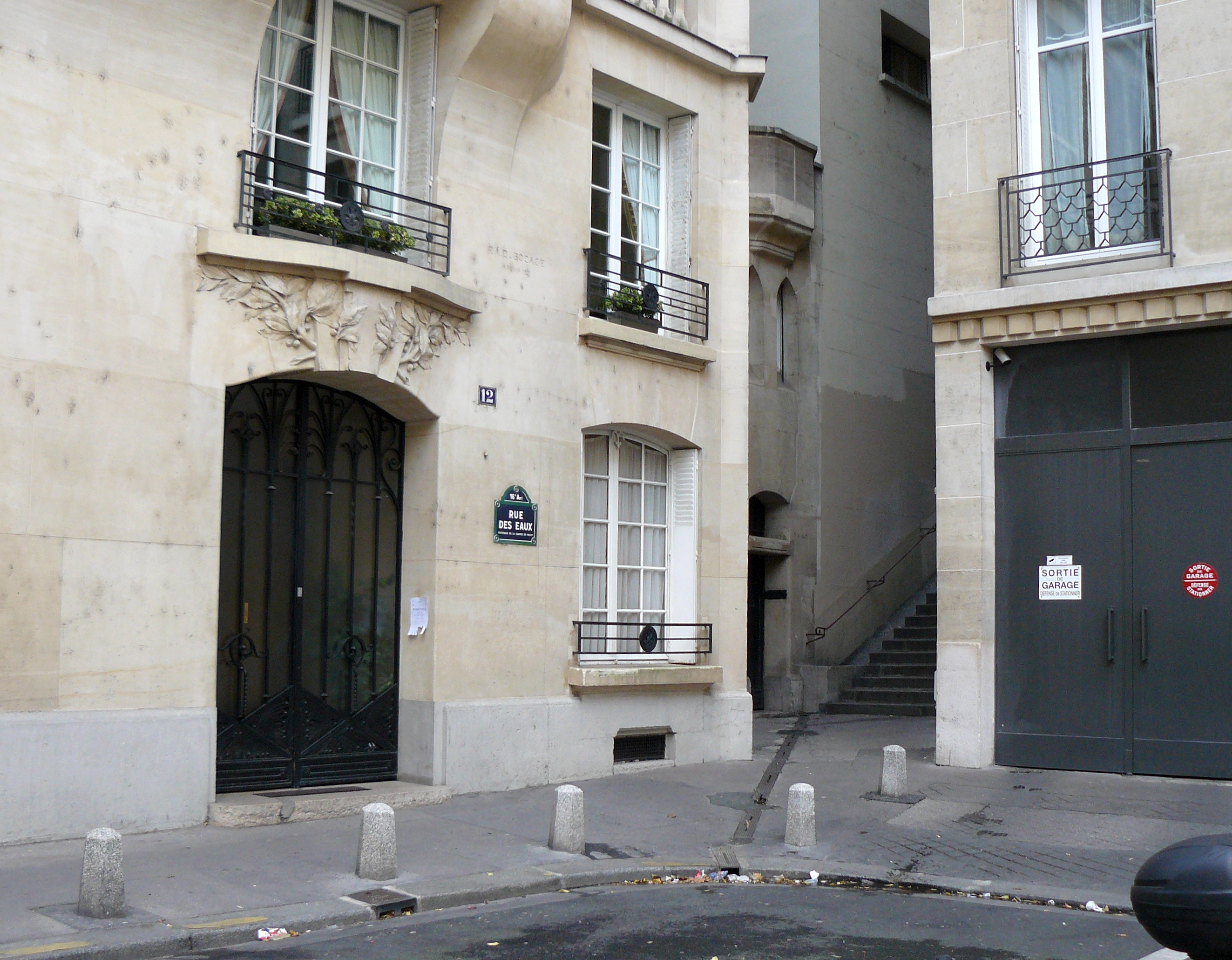 Rue des Eaux - Paris 16e arrond. - La partie supérieure de la rue qui se finit en voie piétonne - Débouché sur la rue Reynouard en montant. Cette vue : début de la partie piétonne en bas et fin de la partie "normale" venant du quai de Passy.